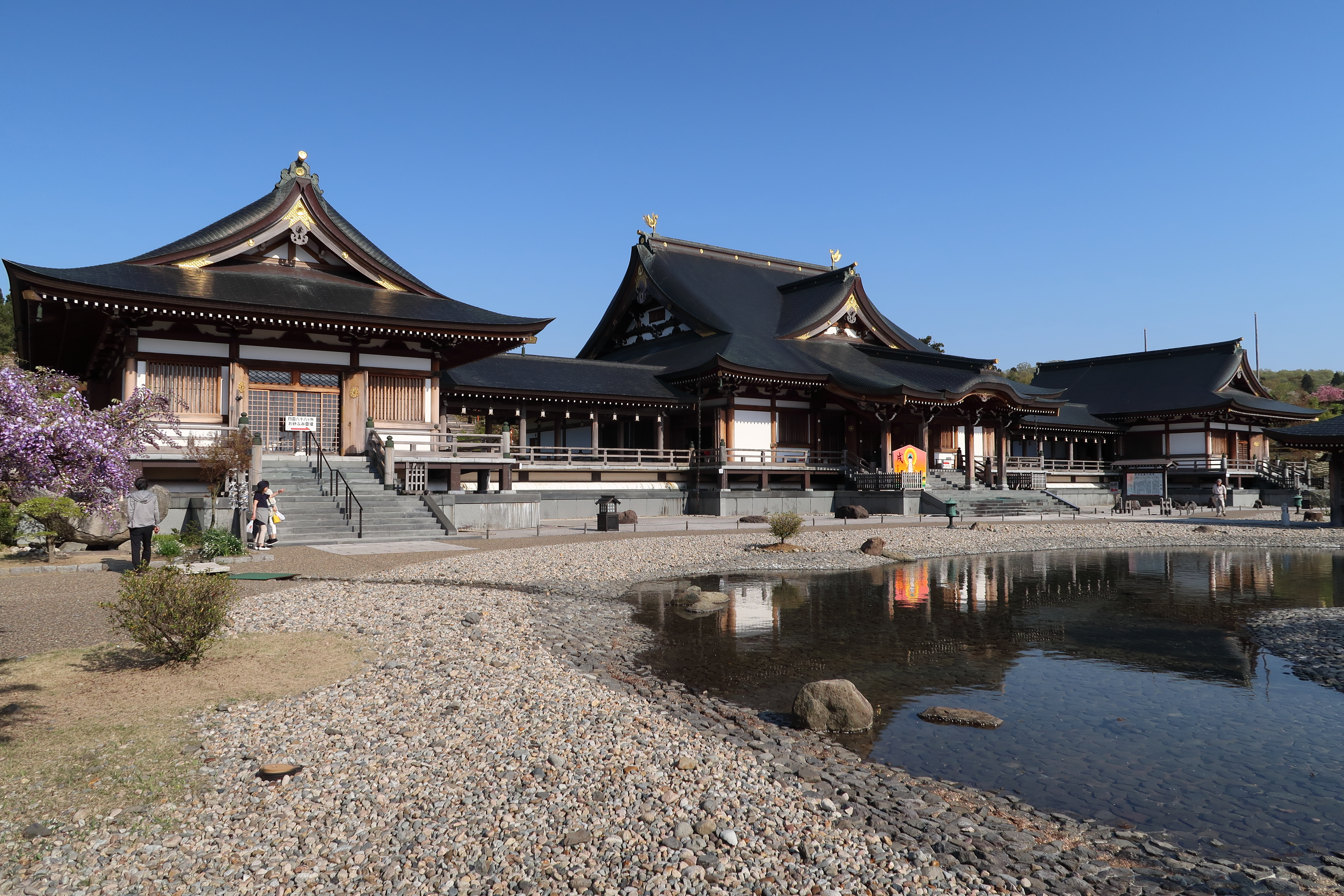 倶利迦羅不動寺鳳凰殿